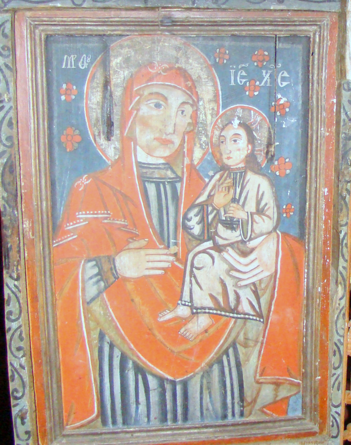 Biserica de lemn „Sf. Arhangheli Mihail și Gavril”